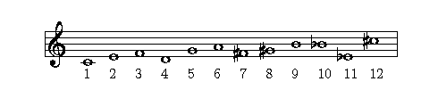 Série de Lulu dans l'opéra Lulu d'Alban Berg